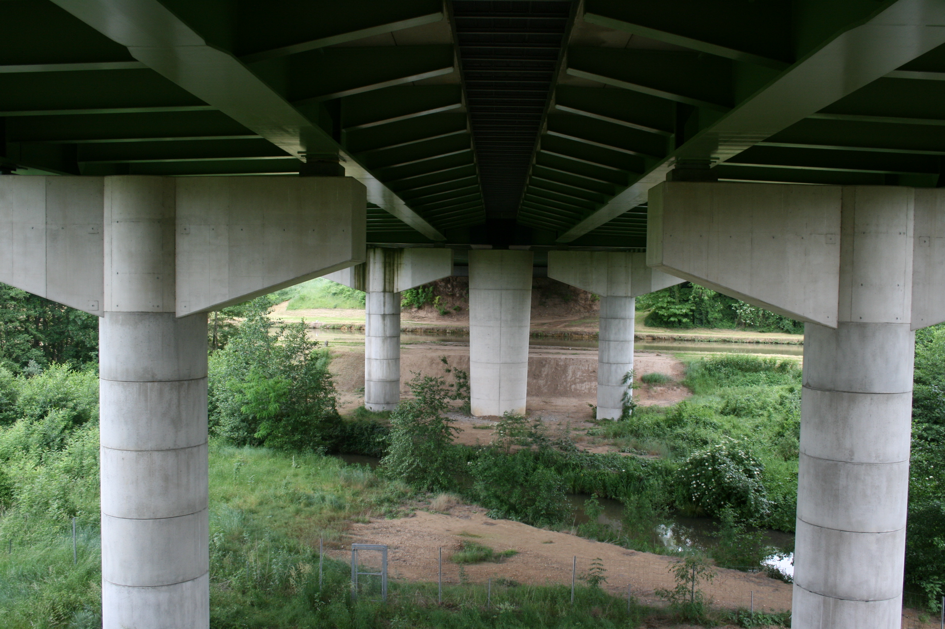 Viaduc de Briare - Pont Bowstring supportant l'autoroute A77 et franchissant le Canal de Briare et la Trézée - département du Loiret - France